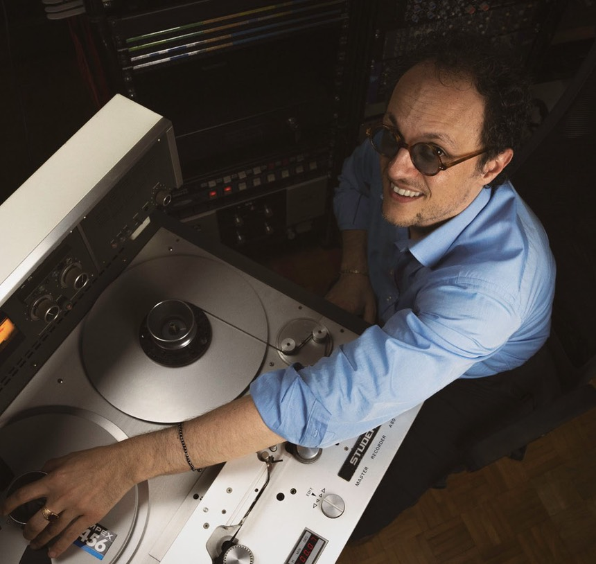 Foto con studer